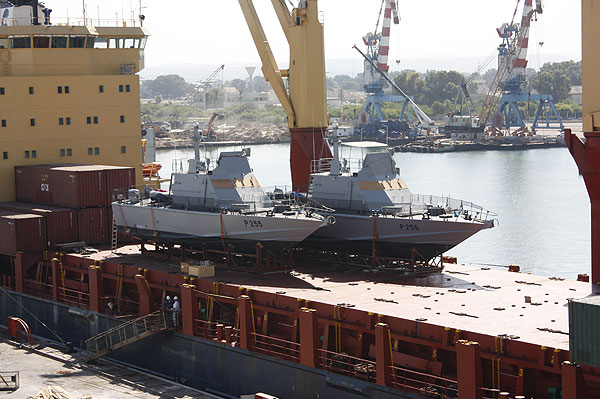 זוג ספינות שלדג סימן 2 על סיפון אונית סוחר בדרך לאפריקה